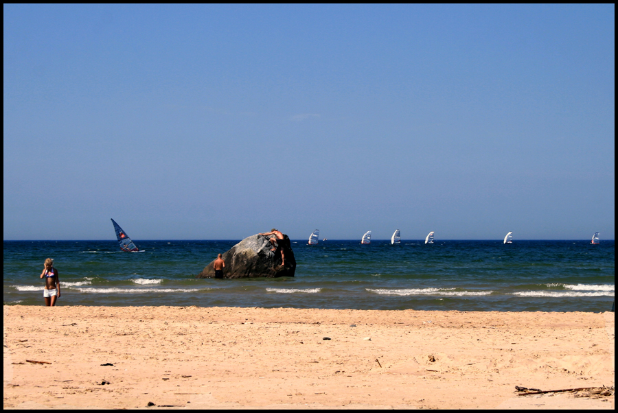 Pavilosta beach